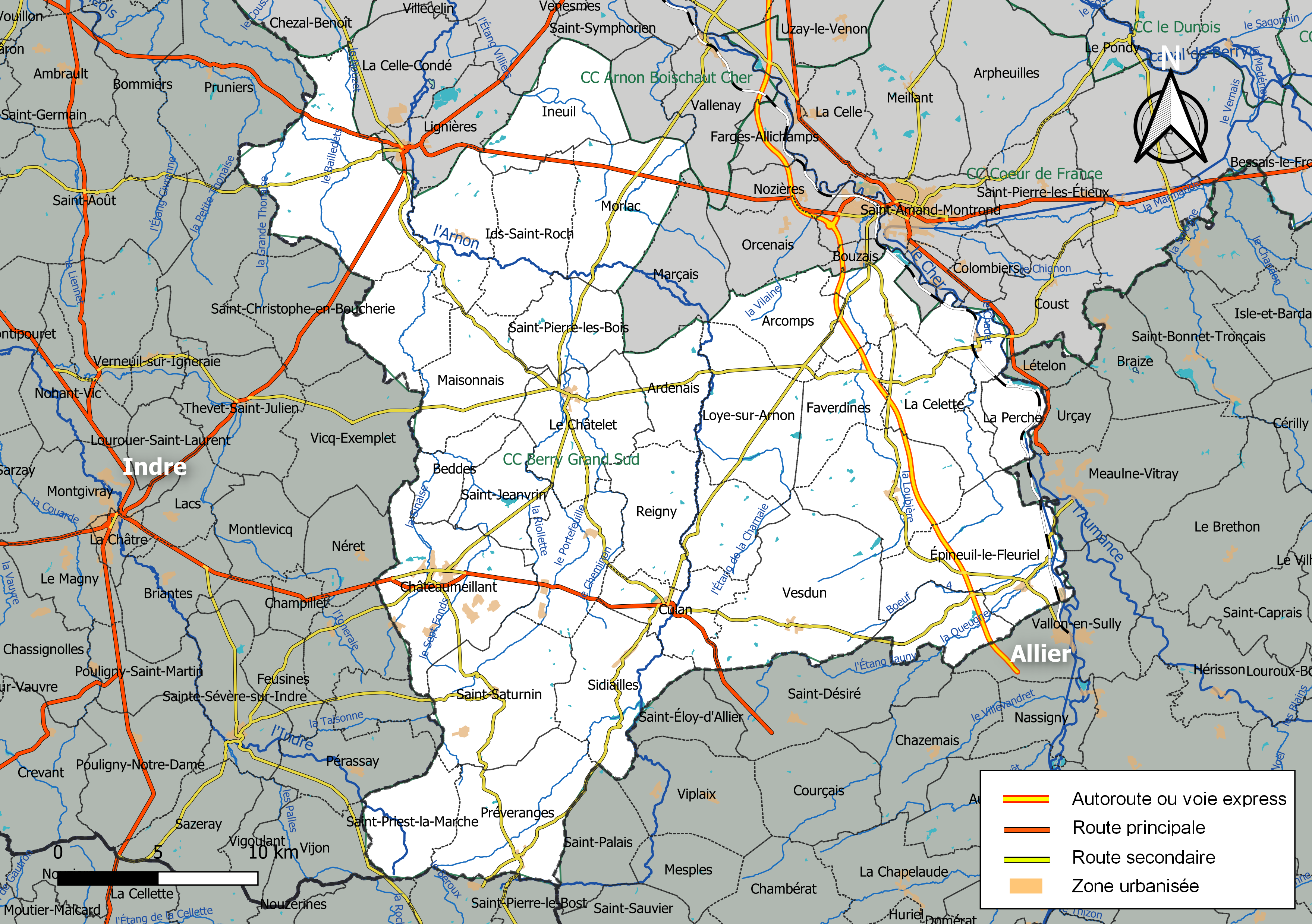 Carte géographique de la communauté de communes Berry Grand Sud, département du Loiret, France. Composition au 1er janvier 2019.